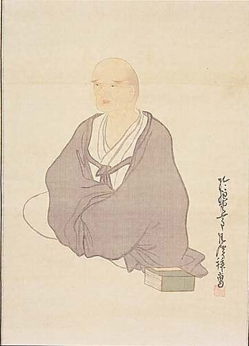 与謝蕪村(1716-1784)